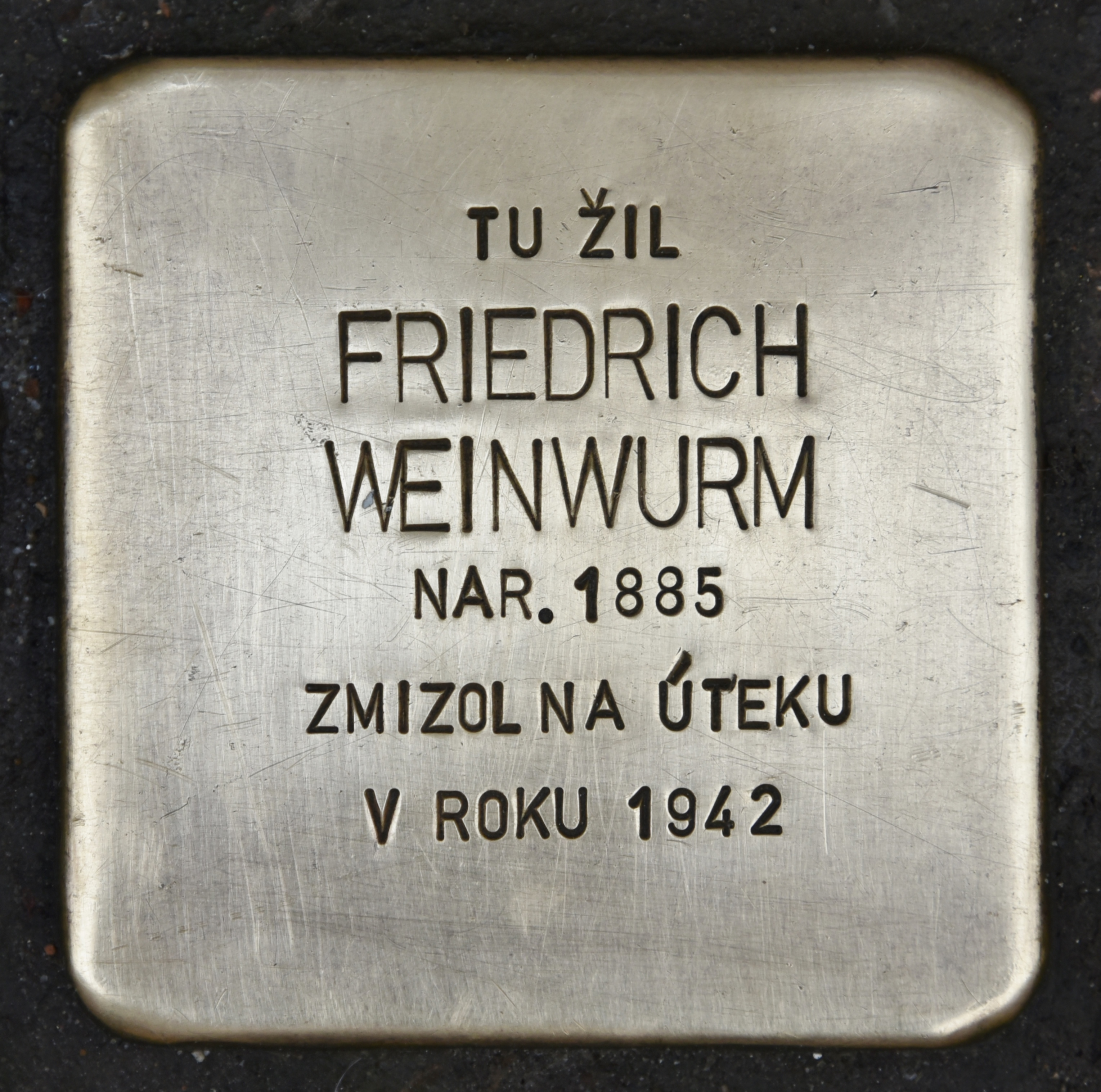 Stolperstein für Friedrich Weinwurm